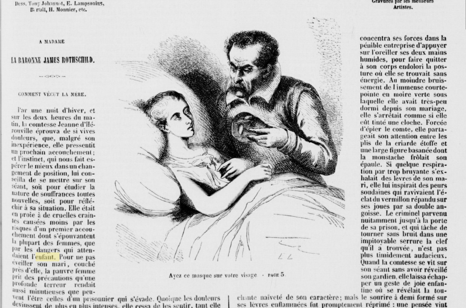 Titre : Œuvres illustrées de Balzac. La Peau de chagrin. El Verdugo. Louis Lambert. L'Élixir de longue vie. Massimilla Doni. Gambara. L'Enfant maudit. Les Proscrits. La Femme de trente ans. La Grande Bretêche. Béatrix. La Grenadière. La Vendetta. Une double famille Auteur : Balzac, Honoré de (1799-1850) Éditeur : Marescq et Cie (Paris) Date d'édition : 1851-1853 Type : monographie imprimée Langue : Français Format : 8 vol. : fig. ; in-4 Format : application/pdf Droits : domaine public Identifiant : ark:/12148/bpt6k116913b Source : Bibliothèque nationale de France, département Littérature et art, Z-7764 Relation : Provenance : Bibliothèque nationale de France Date de mise en ligne : 23/10/2008